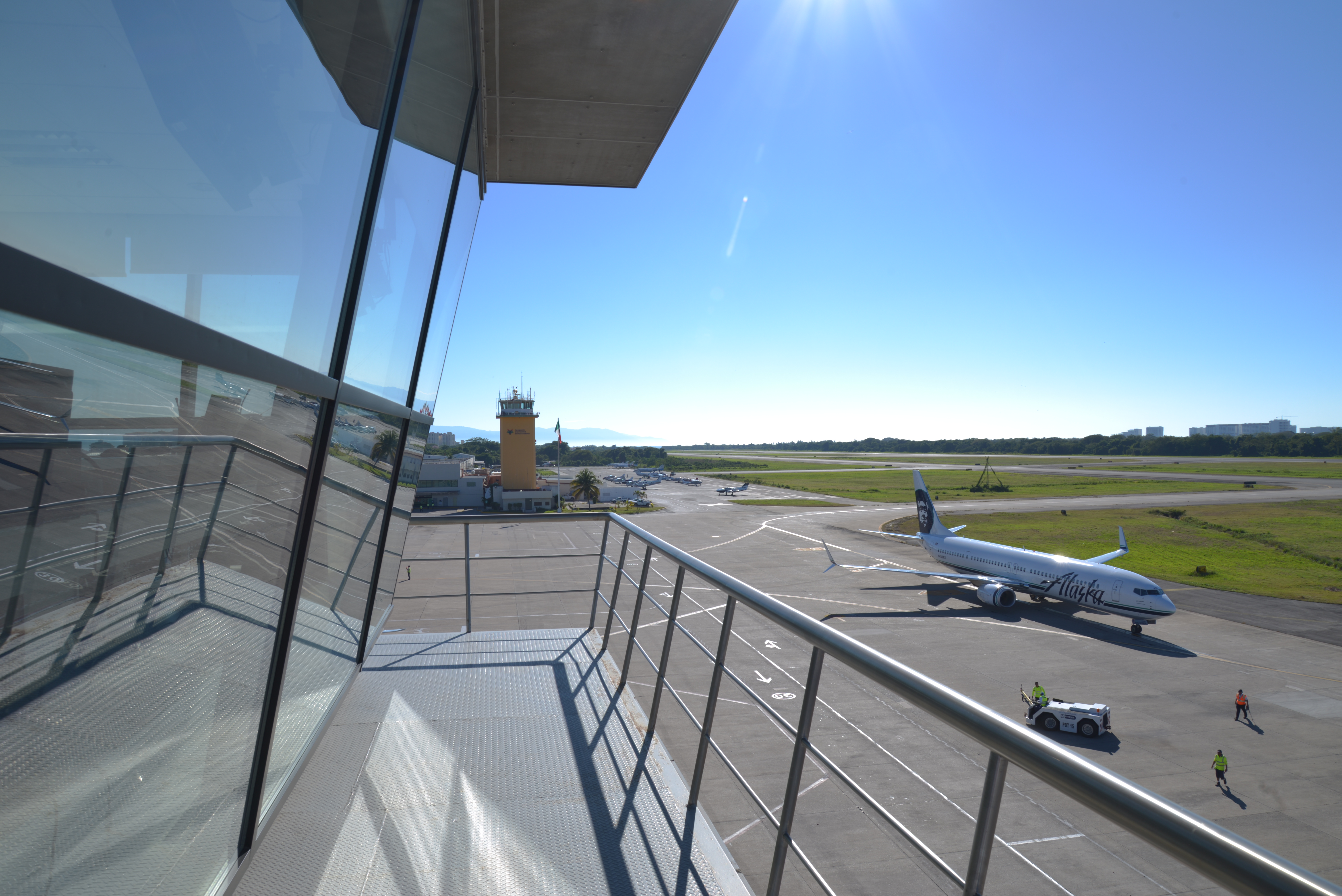 Aeropuerto Puerto Vallarta